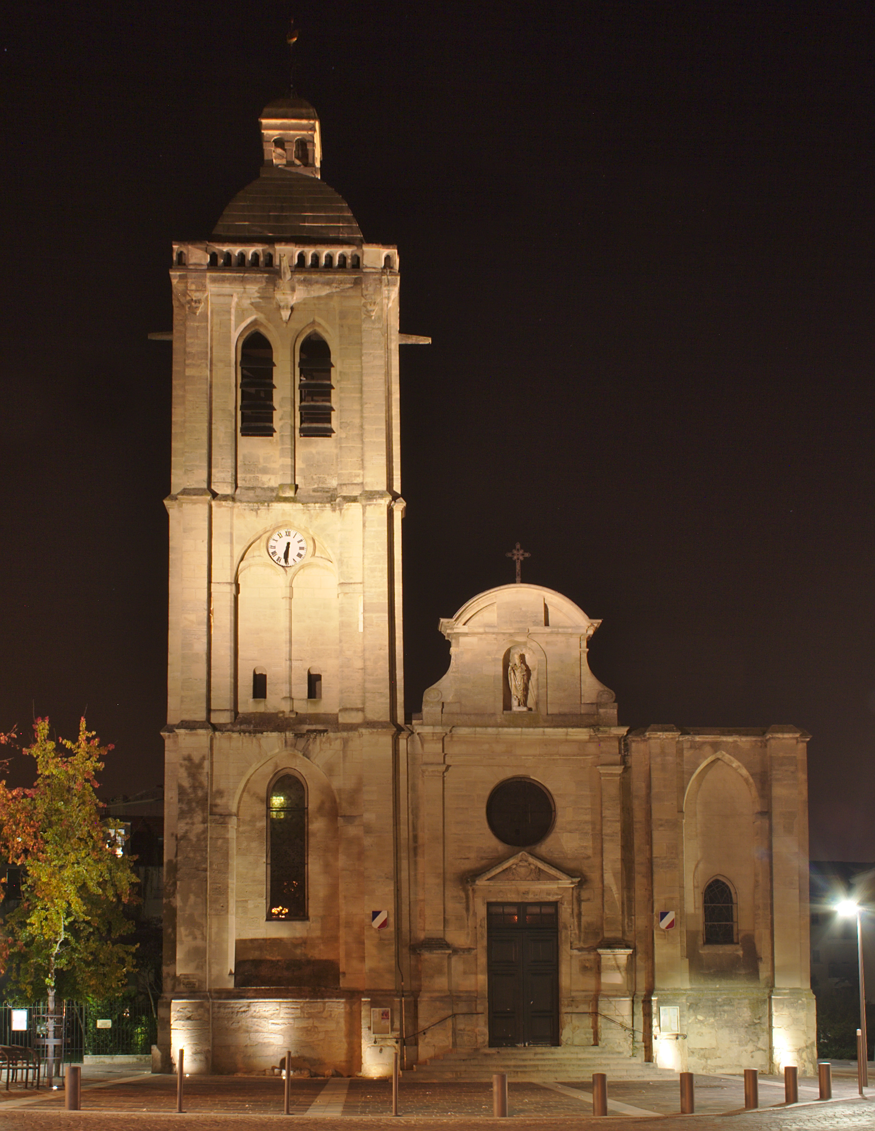 L'église Saint-Nicolas à Houilles vue de nuit